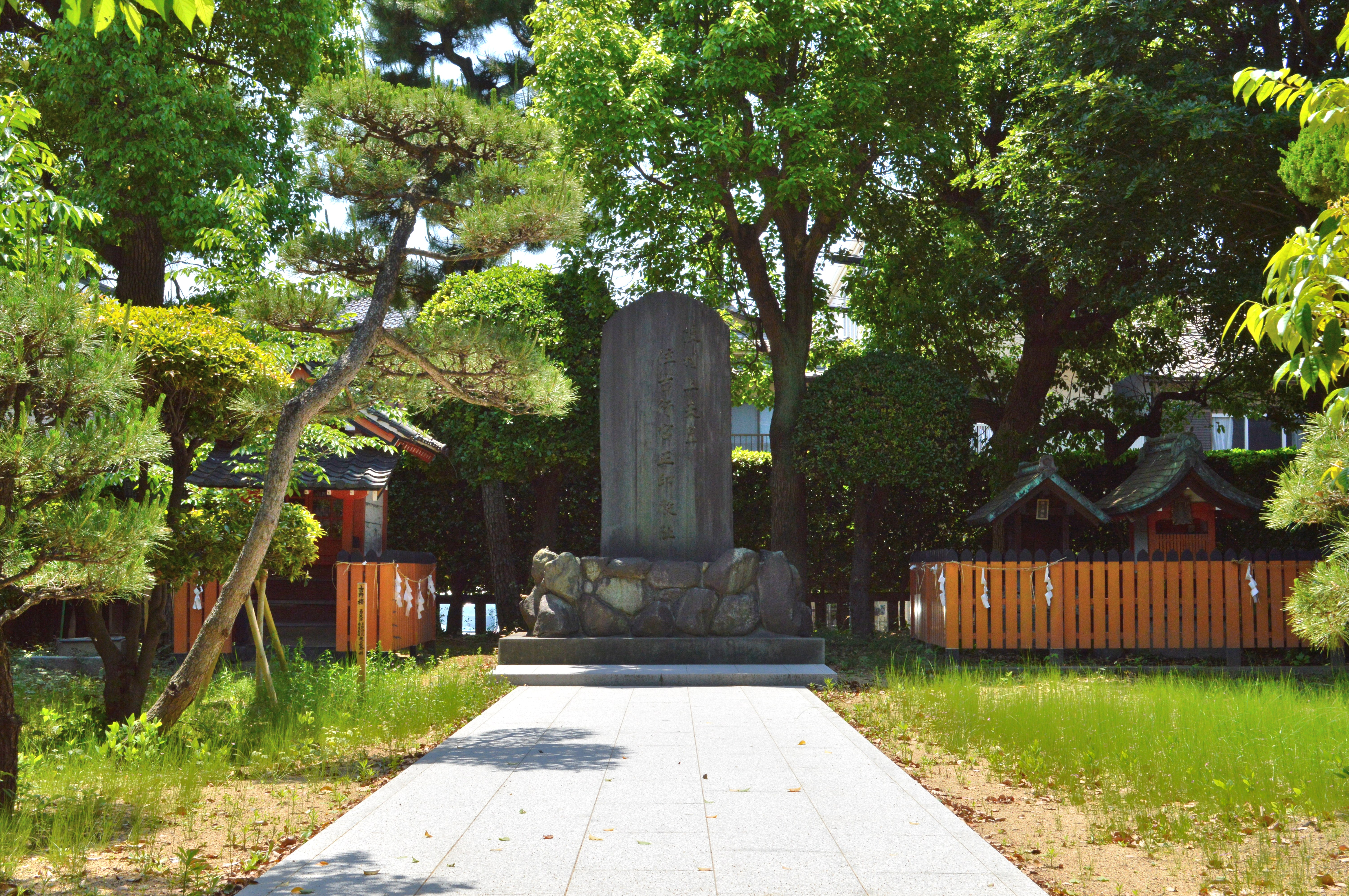 住吉行宮 石碑